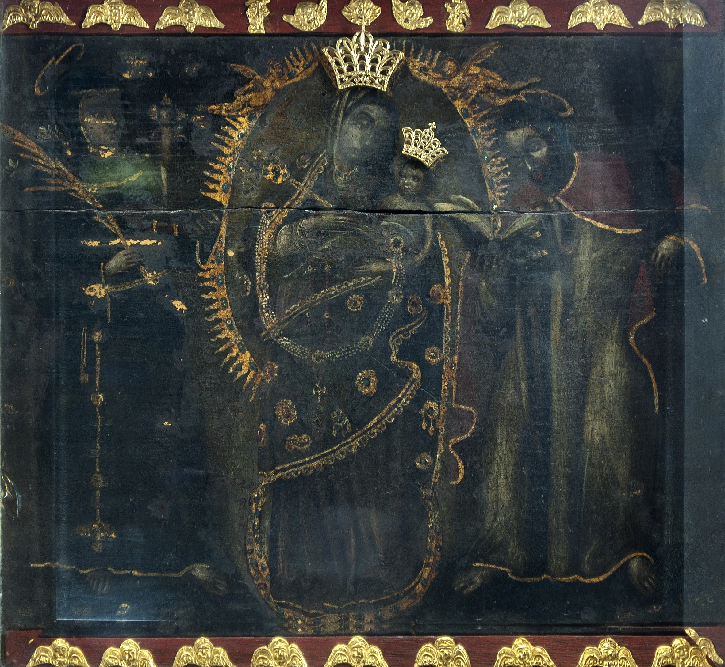 Retablo de la Virgen de la Chiquinquira en la Basilica de la Chinita, Maracaibo, Venezuela